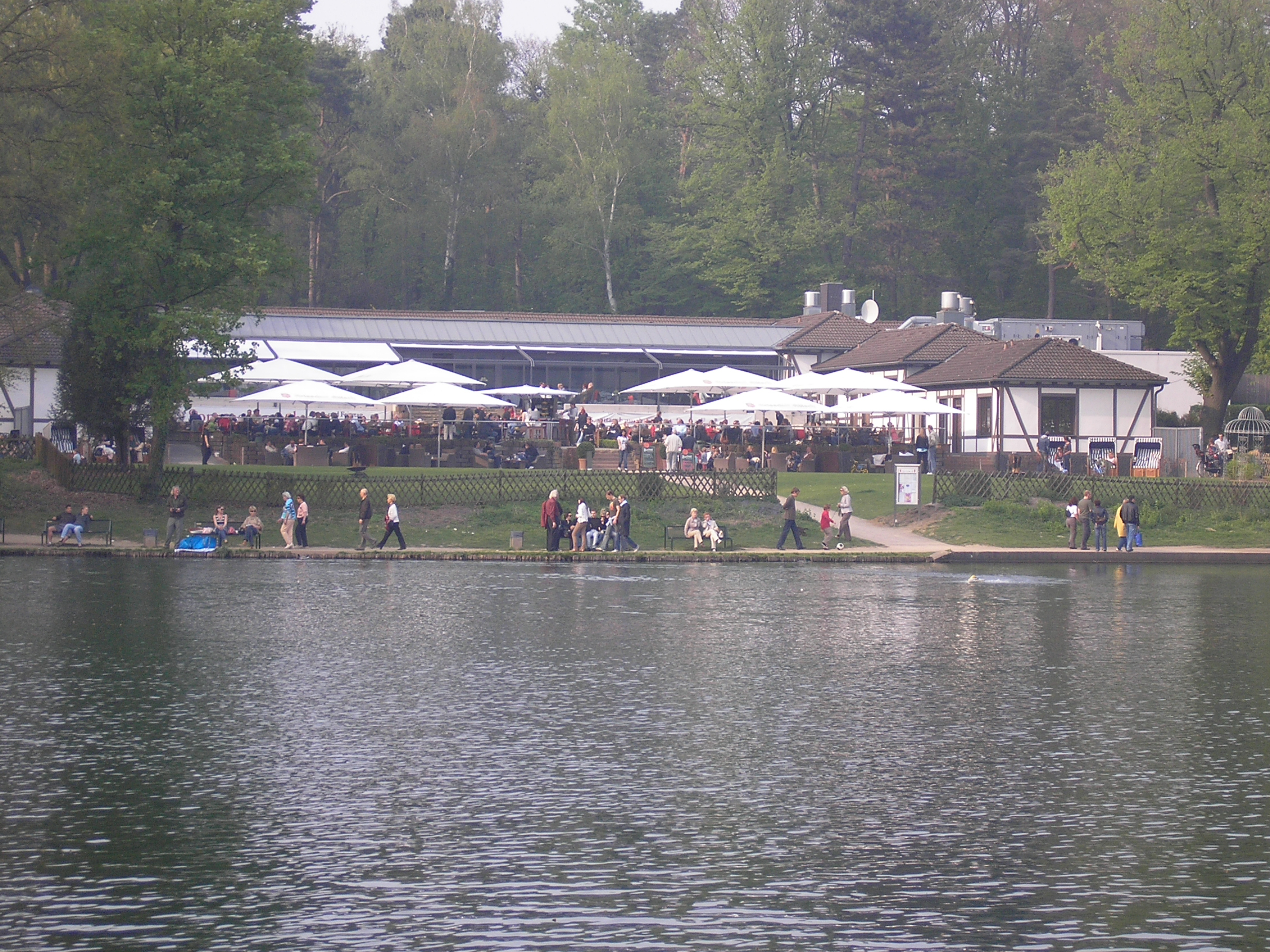 Club Astor am Adenauer-Weiher in Köln-Lindenthal. Der Club Astor diente viele Jahre als Offiziersclub für die belgische Armee in Köln.